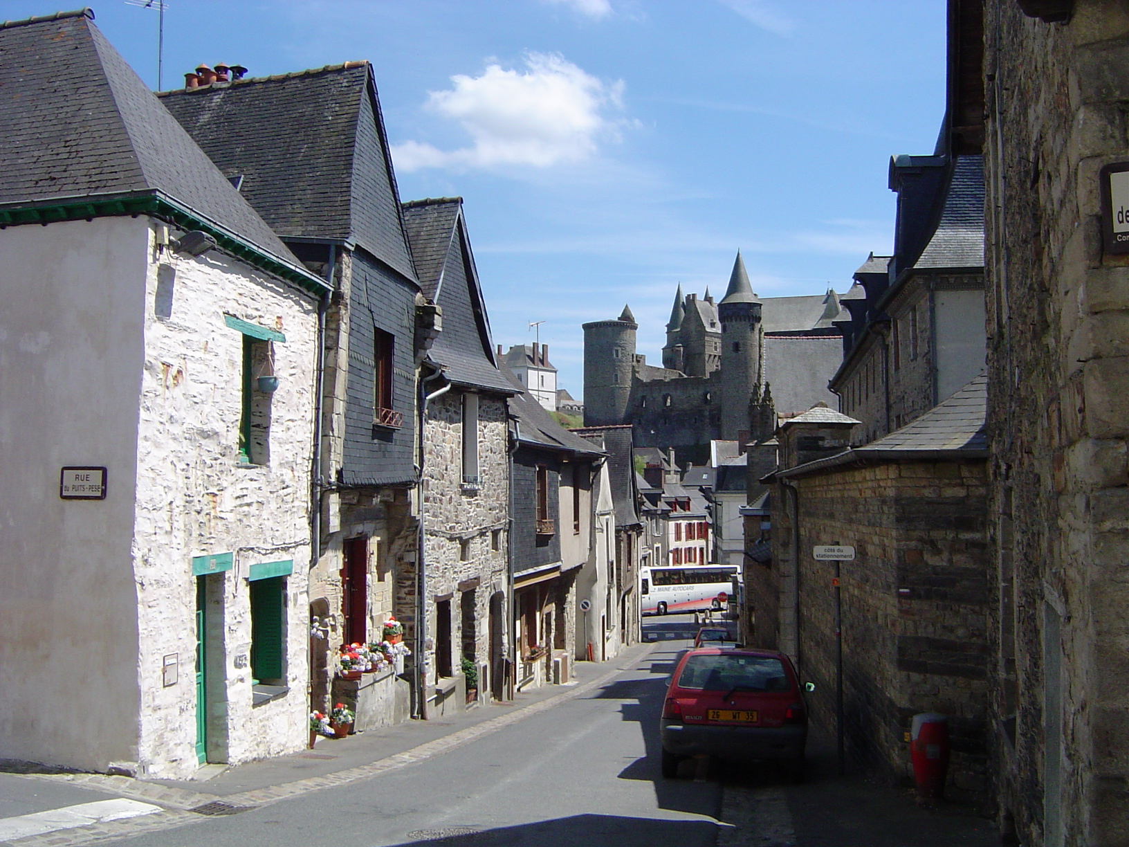 Vitré (Ille-et-Vilaine, France) : Le faubourg du Rachapt et le château au fond.